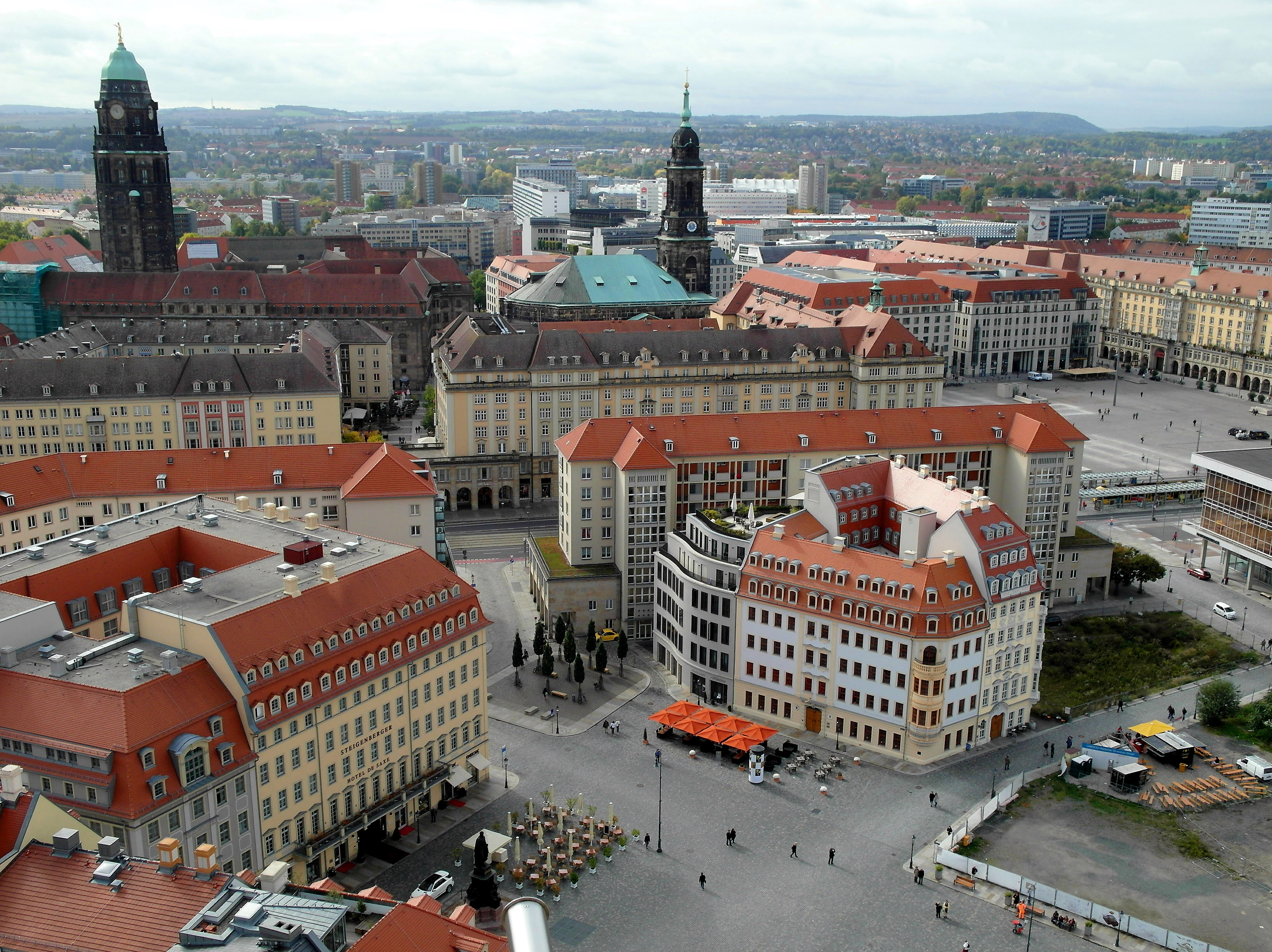 08.10.2012 01067 Dresden-Altstadt: Blick von der Frauenkirche nach Süden. Im Vordergrund rechts die Heinrich-Schütz-Residenz (bestehend aus dem H.-Schütz-Haus Neumarkt 12, rechts angebaut das Köhlersche Haus, Frauenstr. 14). Links vor das Steigenberger Hotel de Saxe, Neumarkt 9. Dahinter der Rathausturm, rechts davon der Turm der Kreuzkirche am Altmarkt. [SAM1402.JPG]20121008170.JPG(c)Blobelt